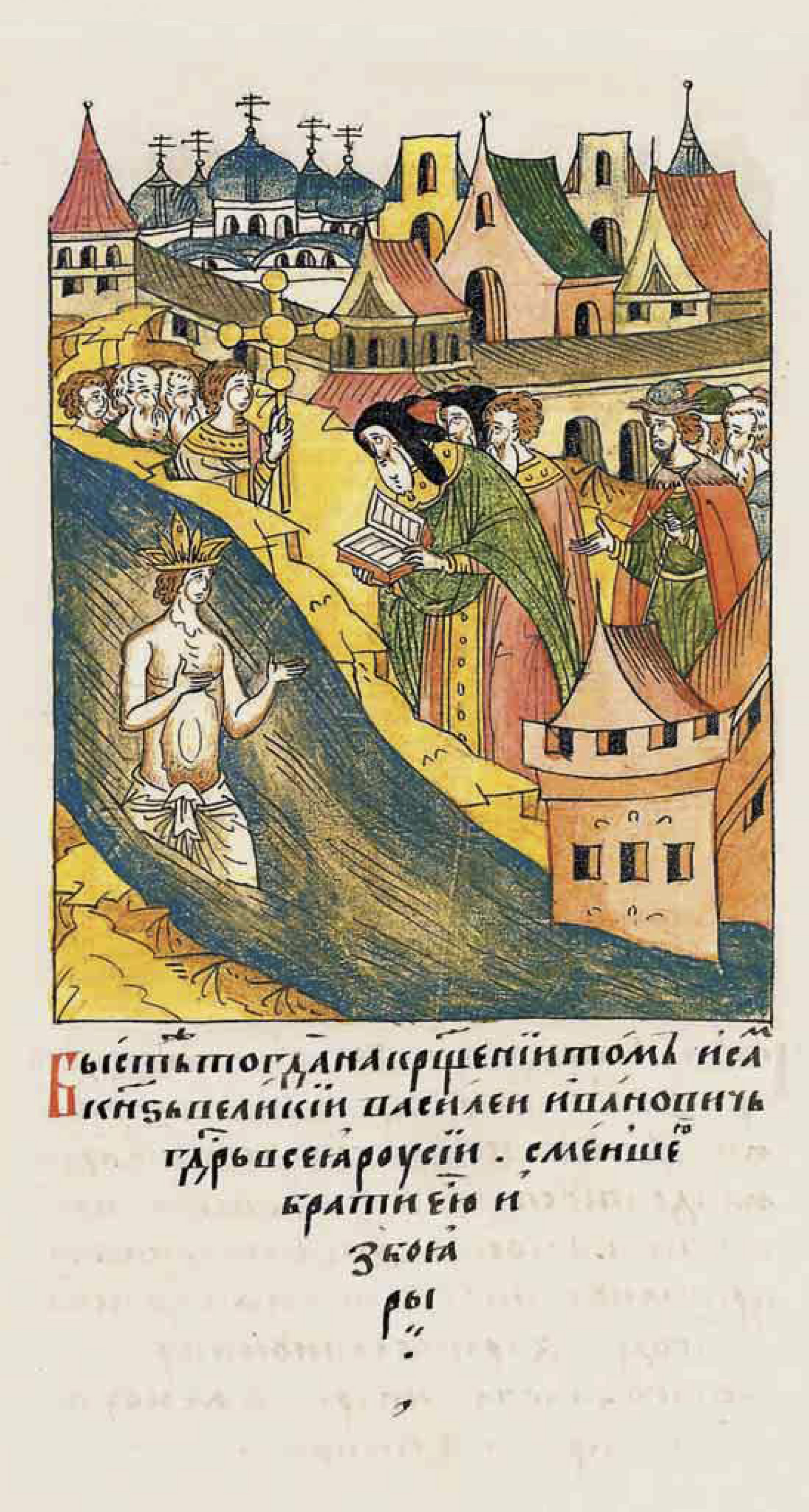 Был же тогда на том крещении и сам великий князь Василий Ивано- вич, государь всея Руси, с младшими братьями и с боярами.